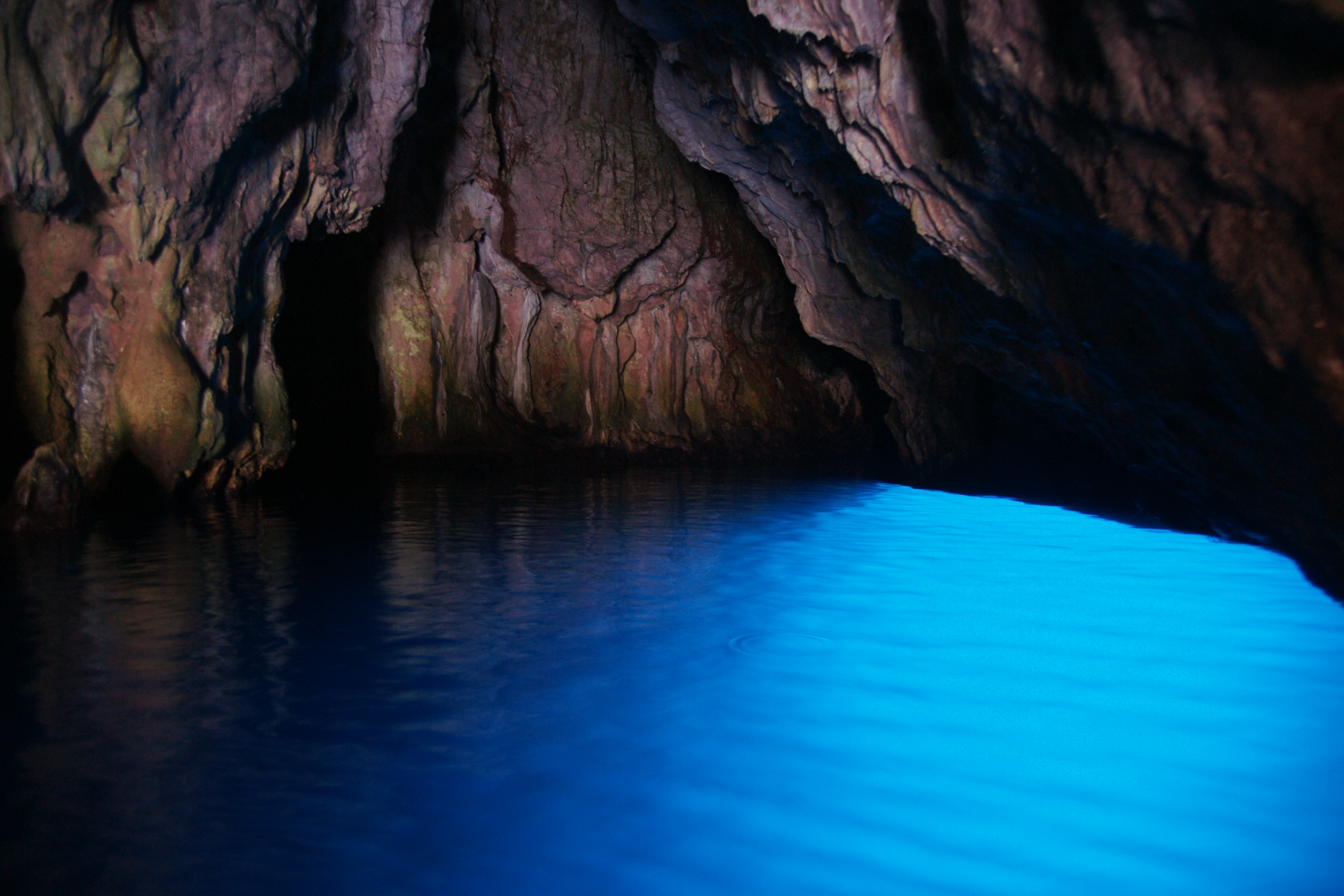 Capo Palinuro: Grotta Azzura, innen